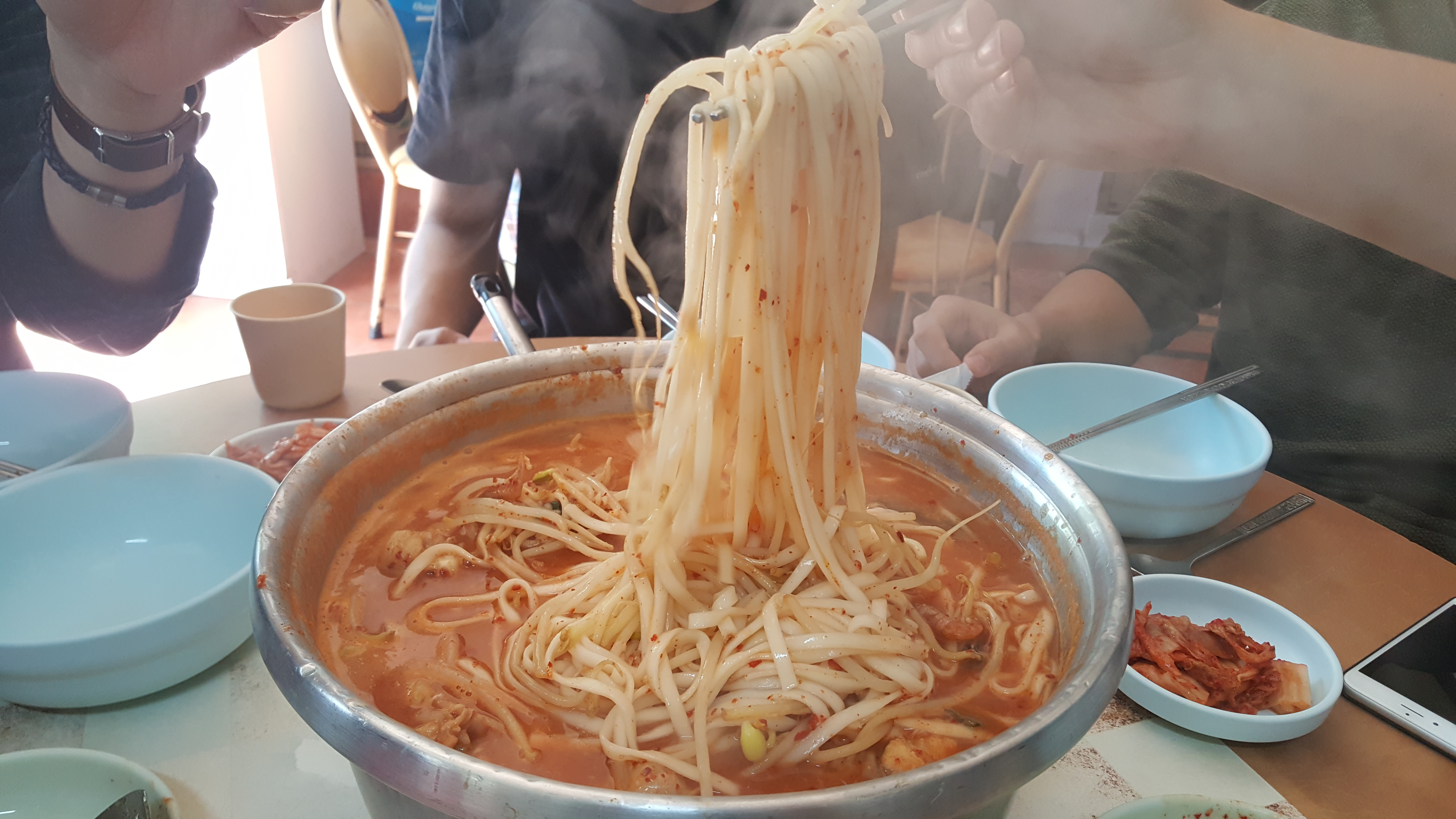 포항 구룡포의 모리국수